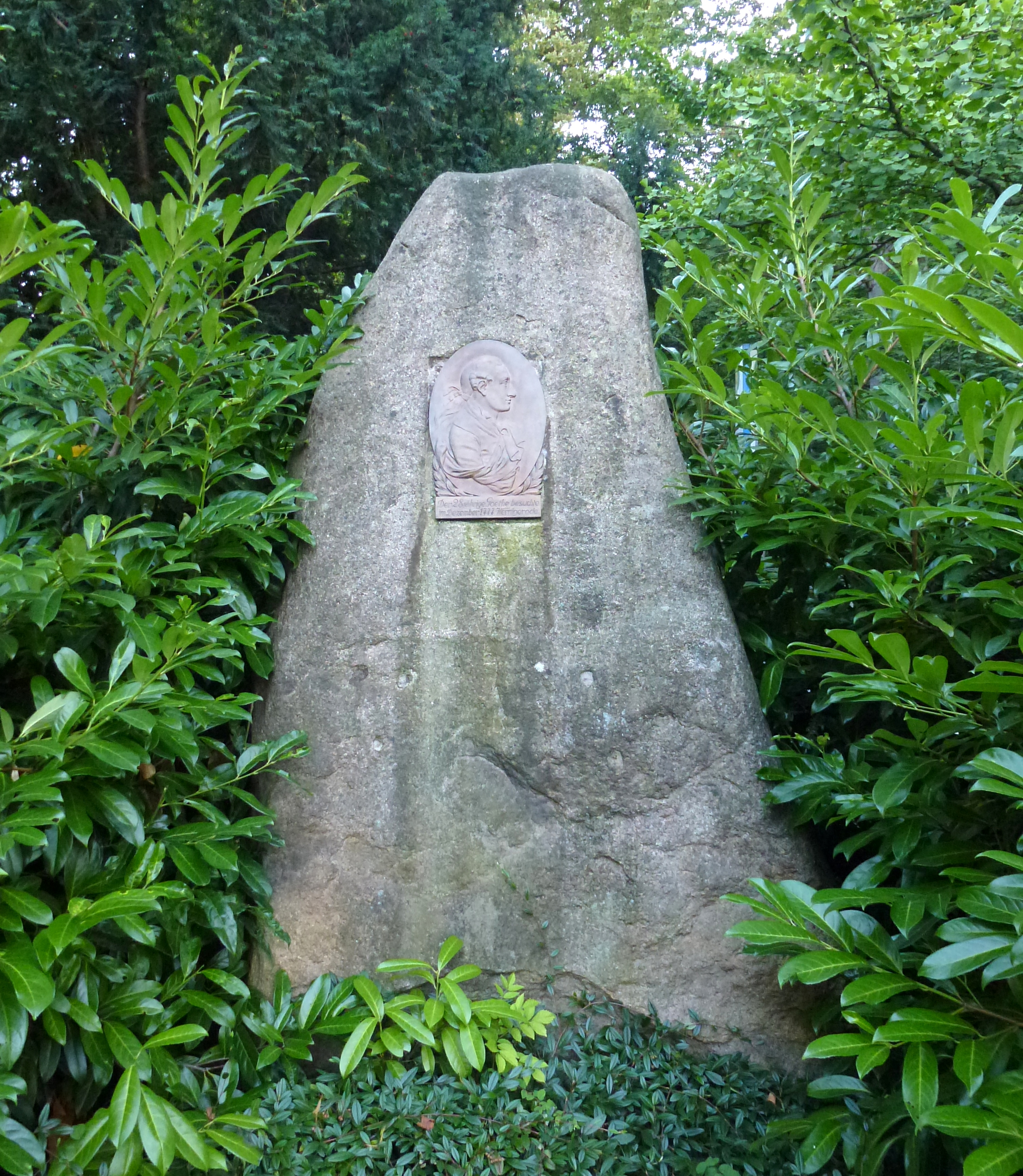 Gedenkstein für den Besuch von Johann Wolfgang von Goethe in Wernigerode. Inschrift: Der 28jährige Goethe besuchte im Dezember 1777 Wernigerode